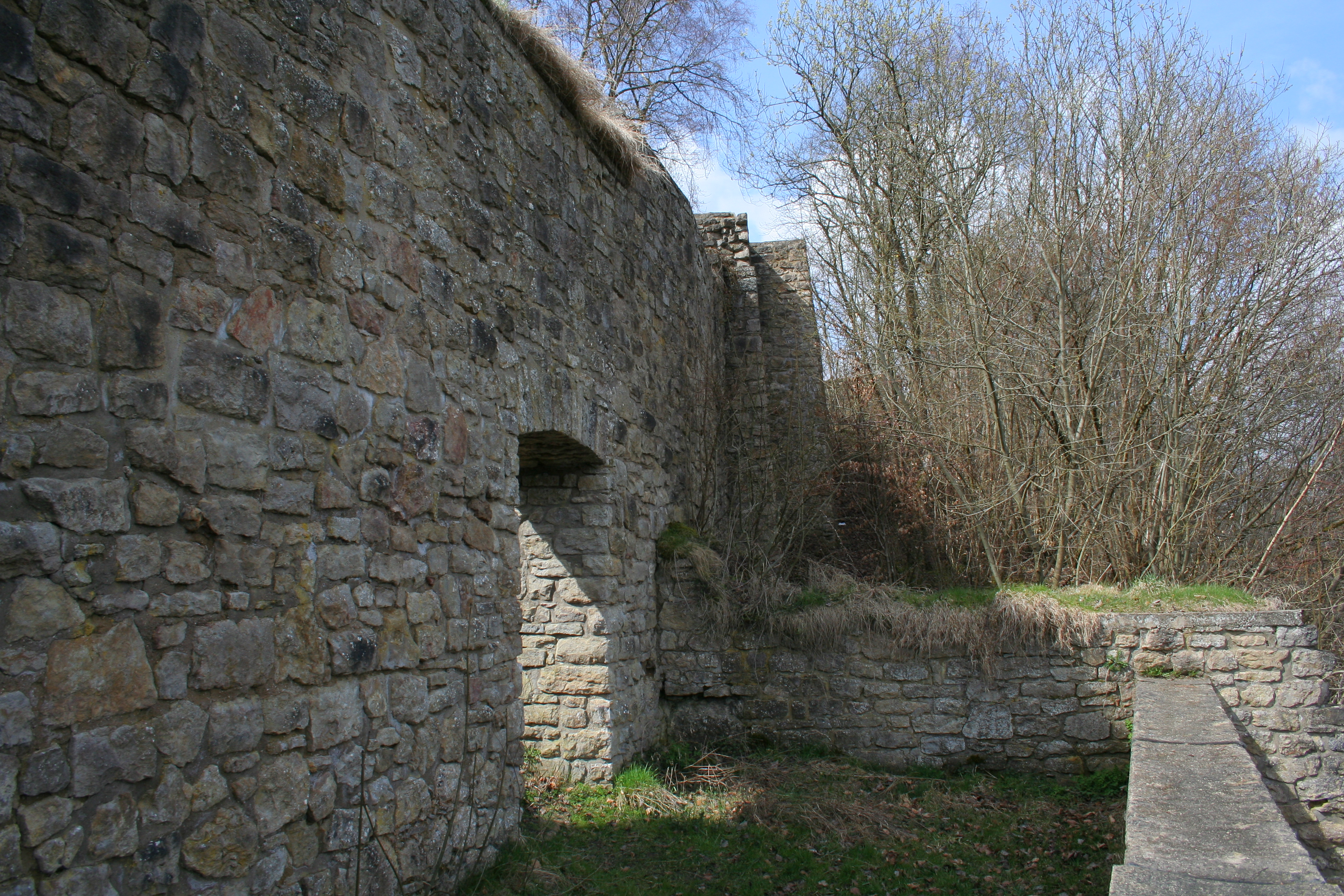 Burgruine Dollendorf-Schloßthal in der Eifel